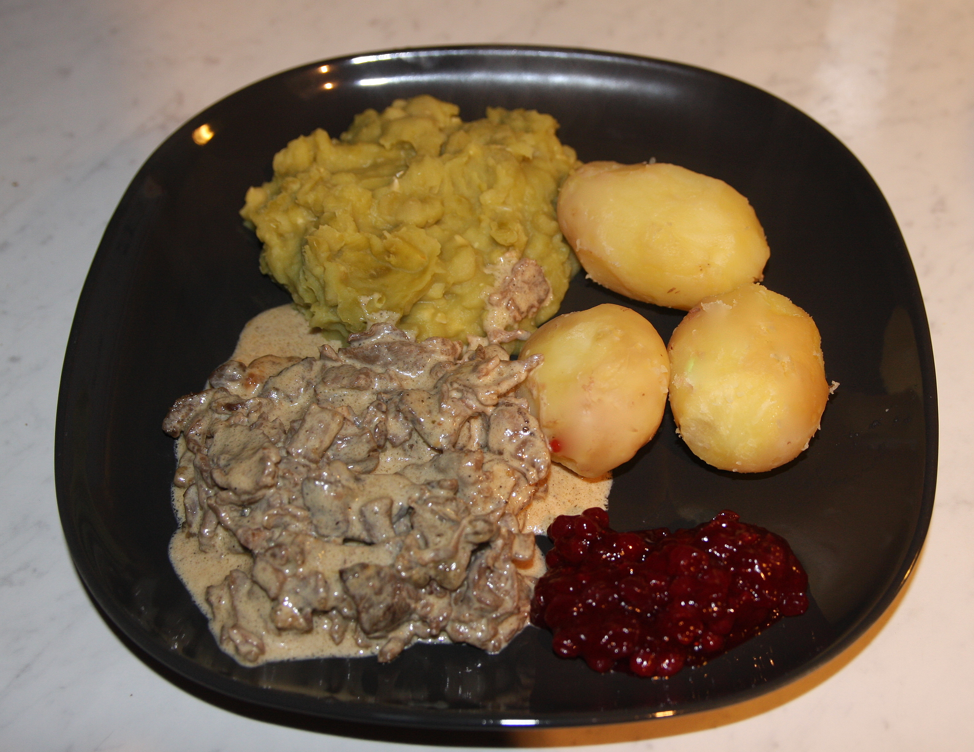 Finnbiff, Tradisjonell, servert med poteter, ertestuing og tyttebær